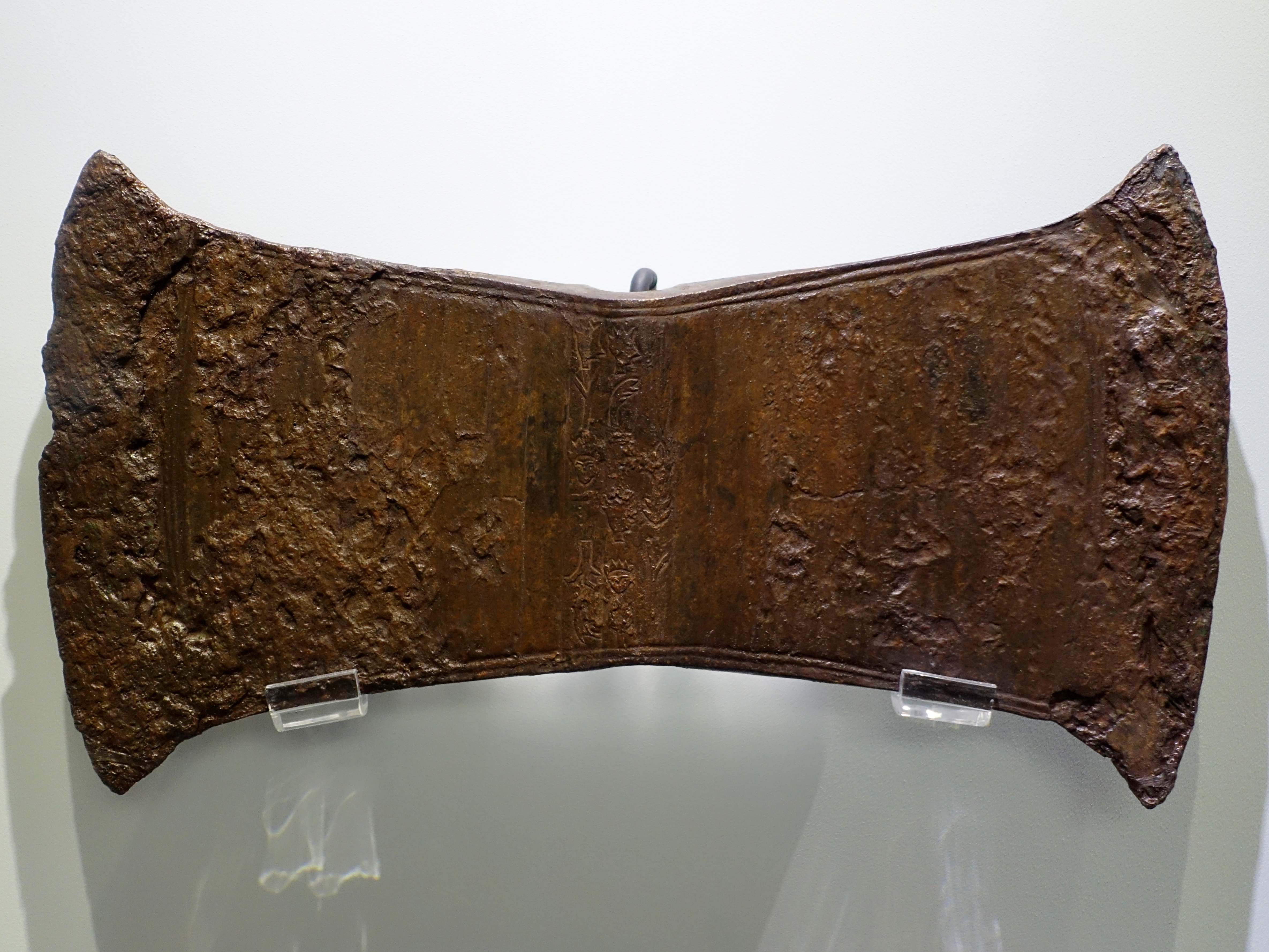 Bronzene Doppelaxt mit eingravierter Inschrift (wahrscheinlich aus dem 17. Jahrhundert v. Chr.) aus Arkalochori, ausgestellt im Archäologischen Museum Iraklio, Kreta, Griechenland